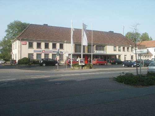 Bahnhof, Emmerich am Rhein, Deutschland